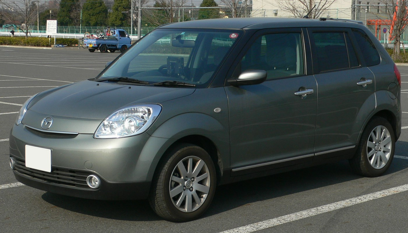 Mazda_Verisa (2004)